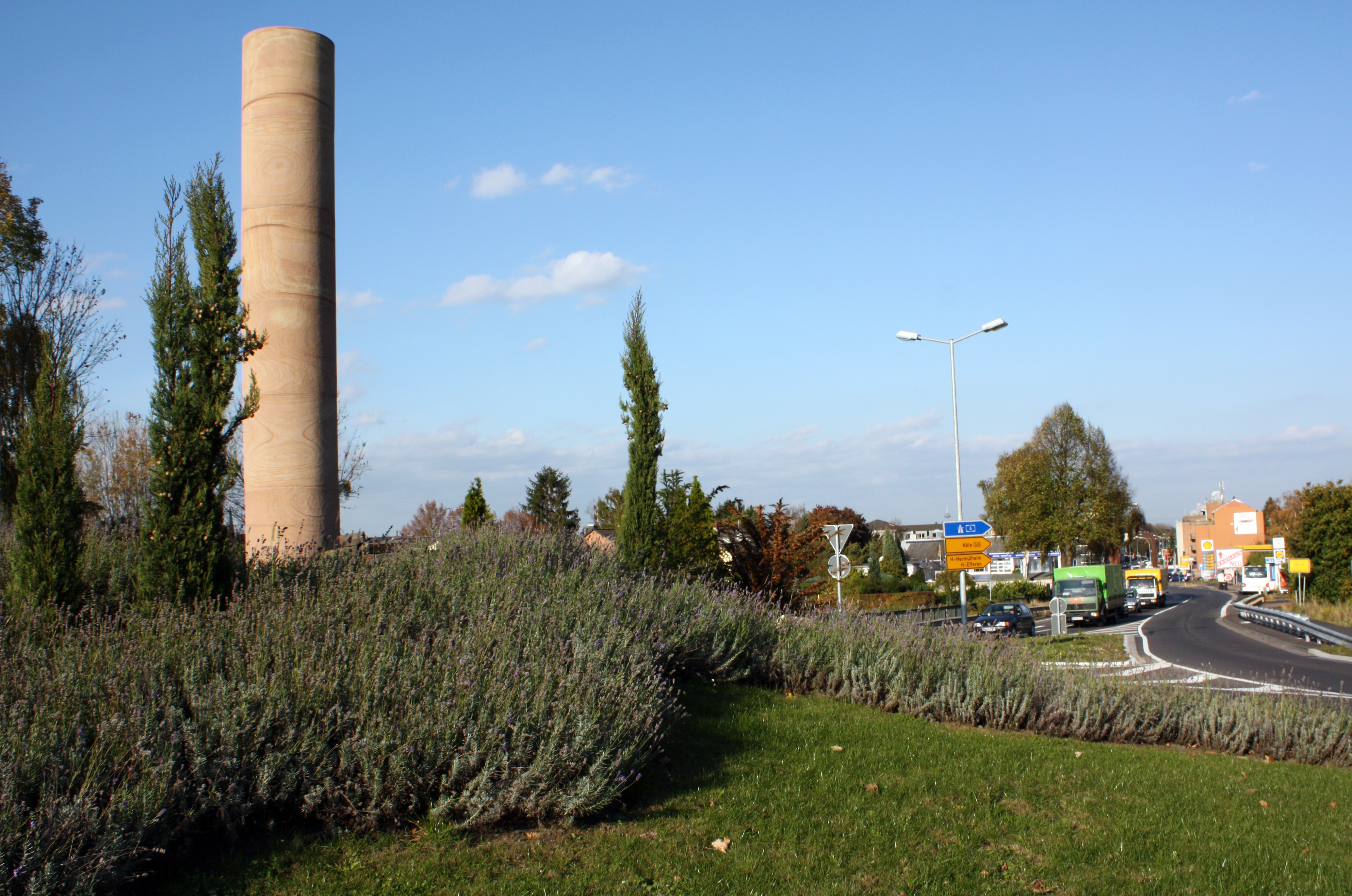 Hürth-Hermülheim, Verteilerkreis Luxemburger Straße